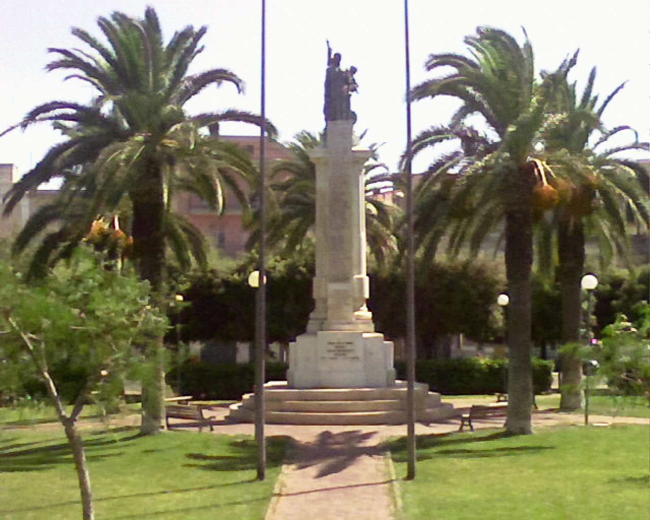 Monumento caduti — Modugno (Bari), Italy